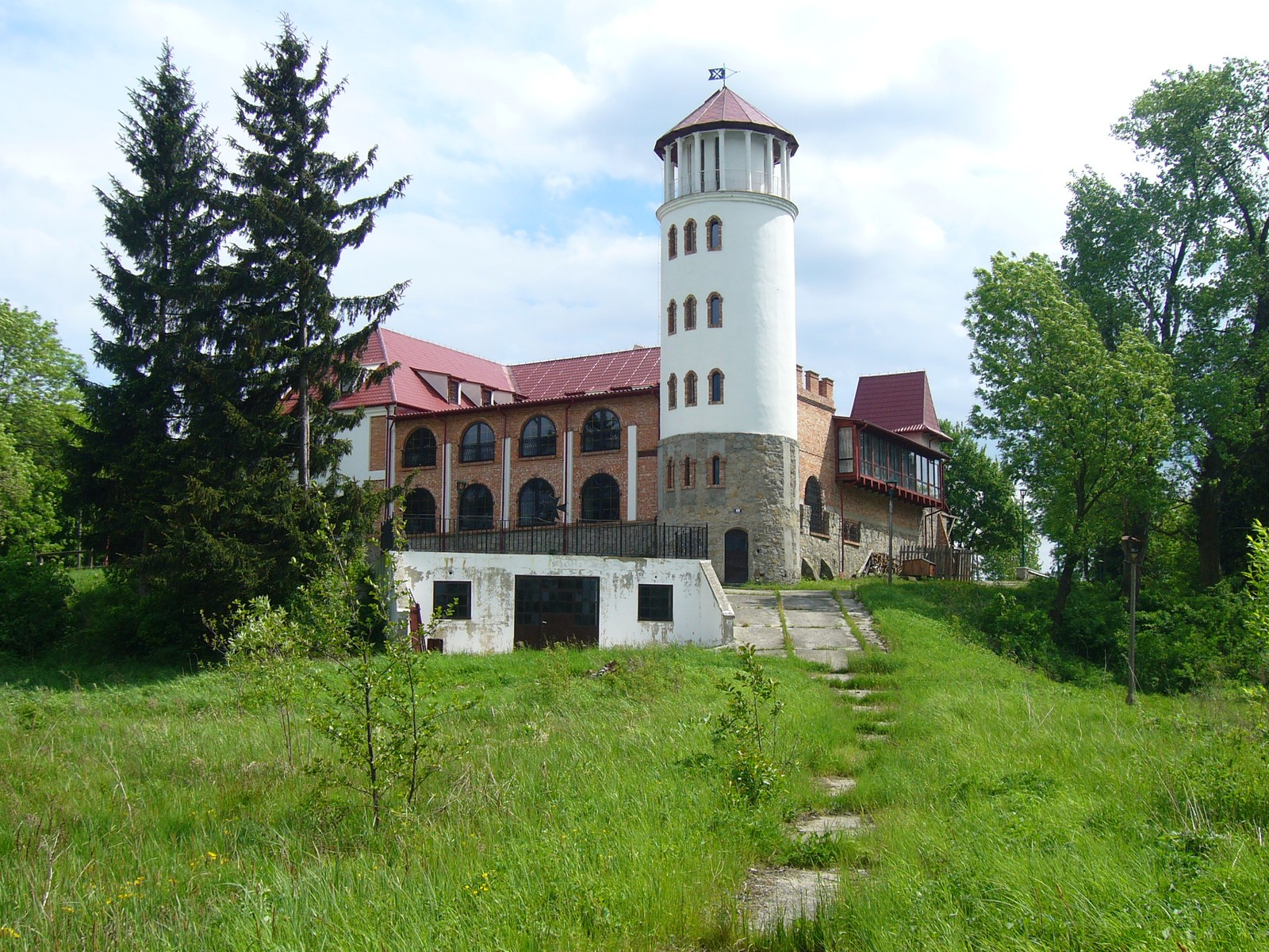 Zamek w Zaklikowie